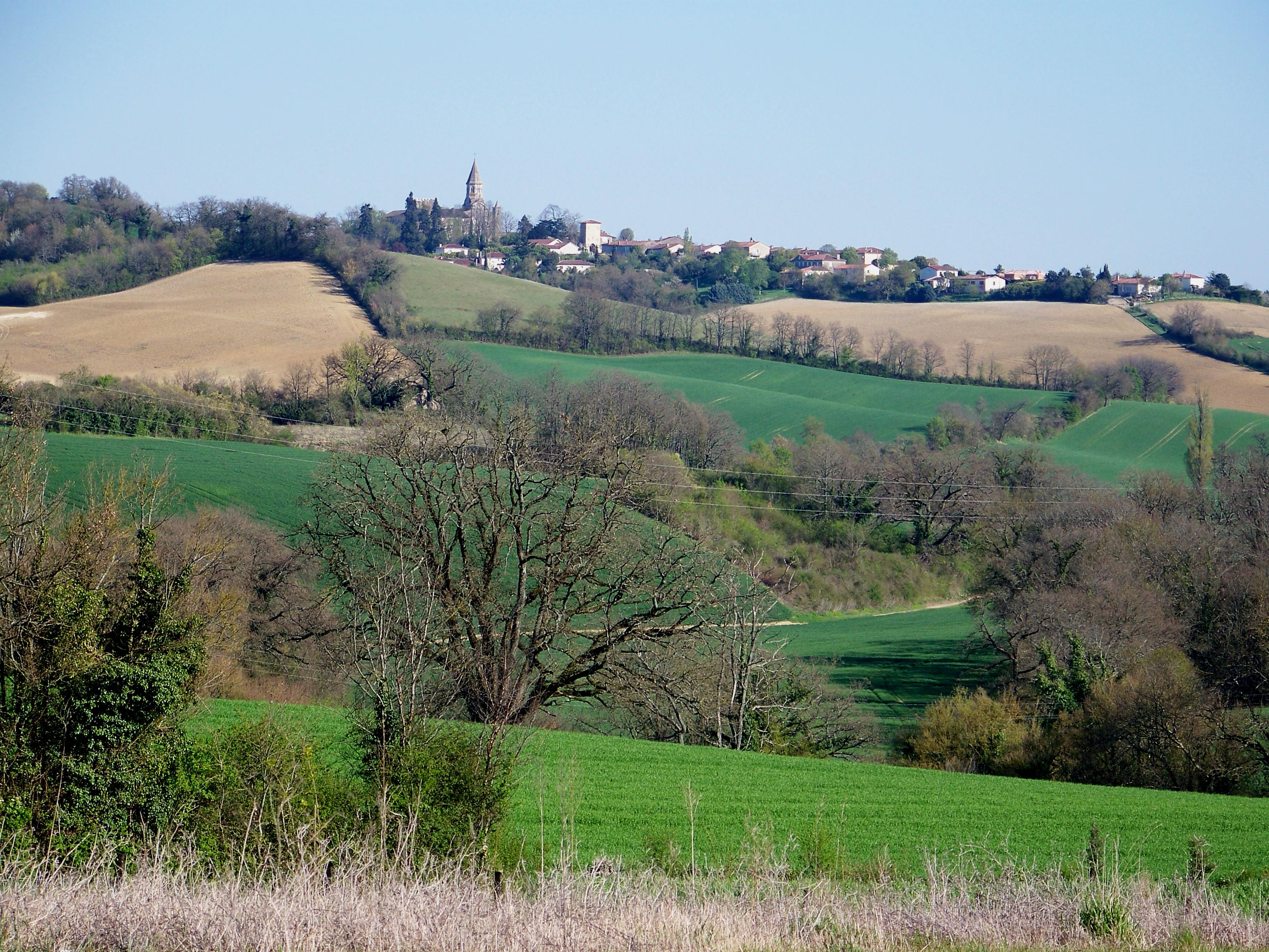 Le village de Montaut-les-Créneaux (Gers) vu du chemin de Forman à Preignan.